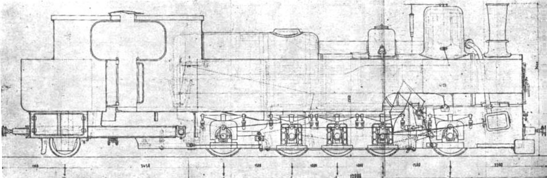 Die BHStB Vc6 war eine Stütztenderlokomotive in Bosnischer Spurweite mit fünf Kuppelachsen und Klose-Lenkwerk. In Betrieb genommen wurde die Maschine von der Bosnisch-Herzegowinischen Staatsbahn (BHStB) im Jahr 1893 als Vc6 Nr. 61. Bei den Jugoslawischen Staatsbahnen (JDŽ) erhielt die Lokomotive die Bezeichnung JDŽ 191-001.